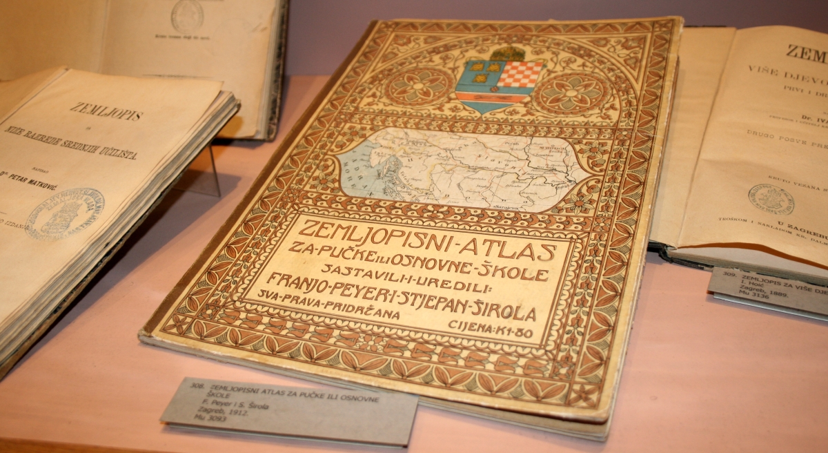 snimljeno tijekom Noći muzeja